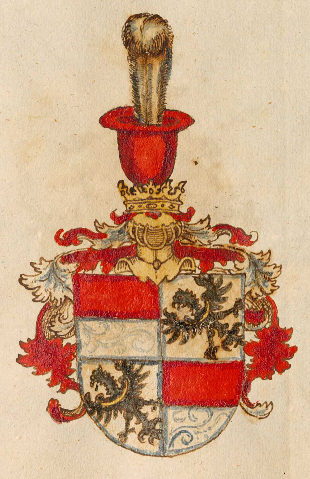 Oldřich Felix Popel z Lobkowicz